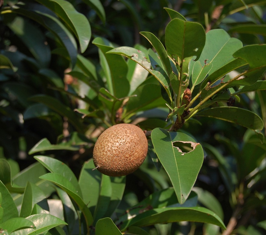 Manilkara zapota, young fruit. From Darmaga, Bogor, West Java, Indonesia.